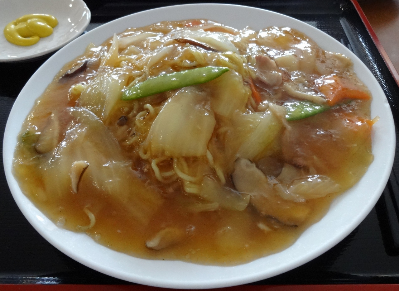 Yakisoba (Otaru Ankake Yakisoba)